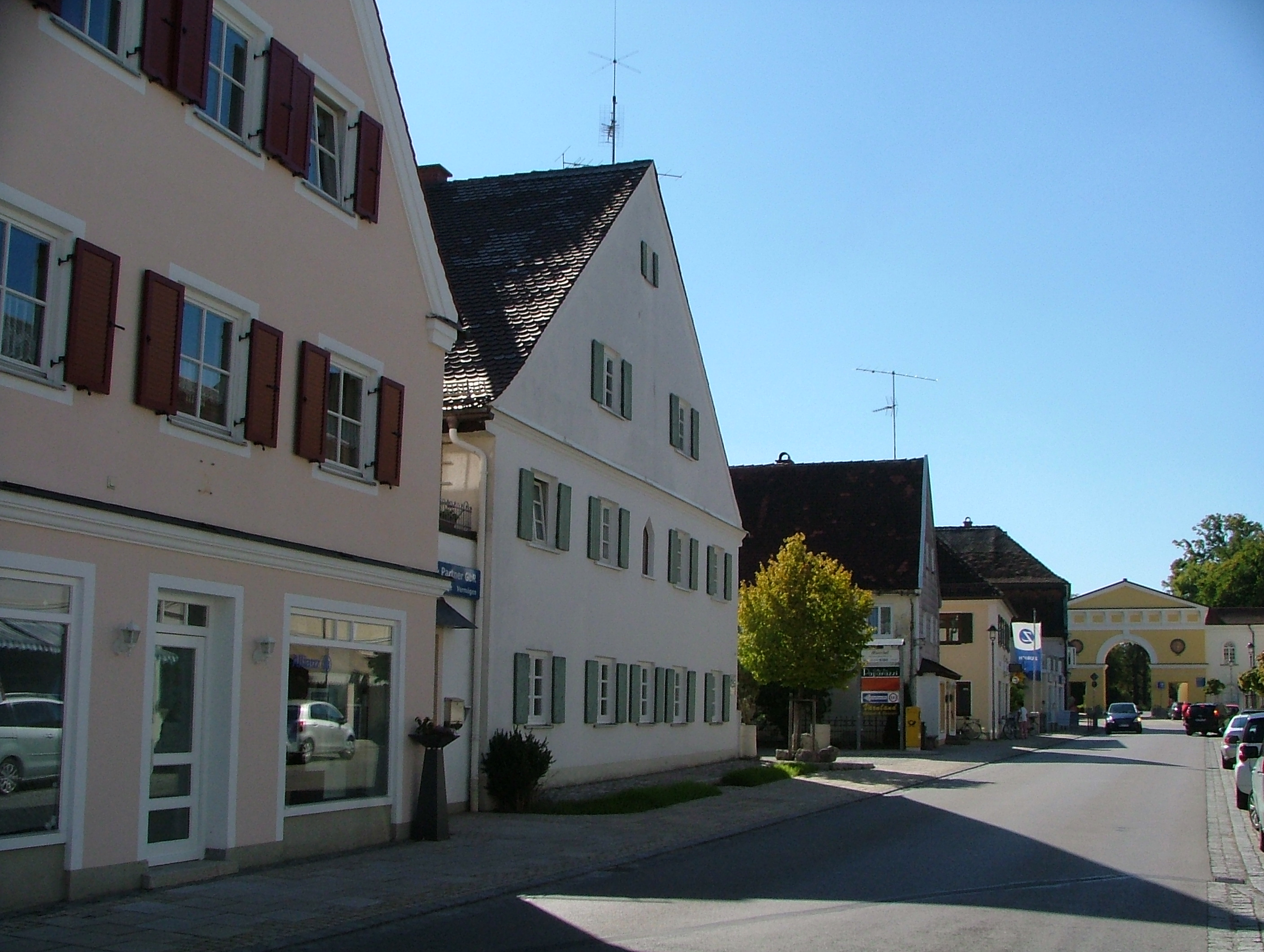 Hauptstraße